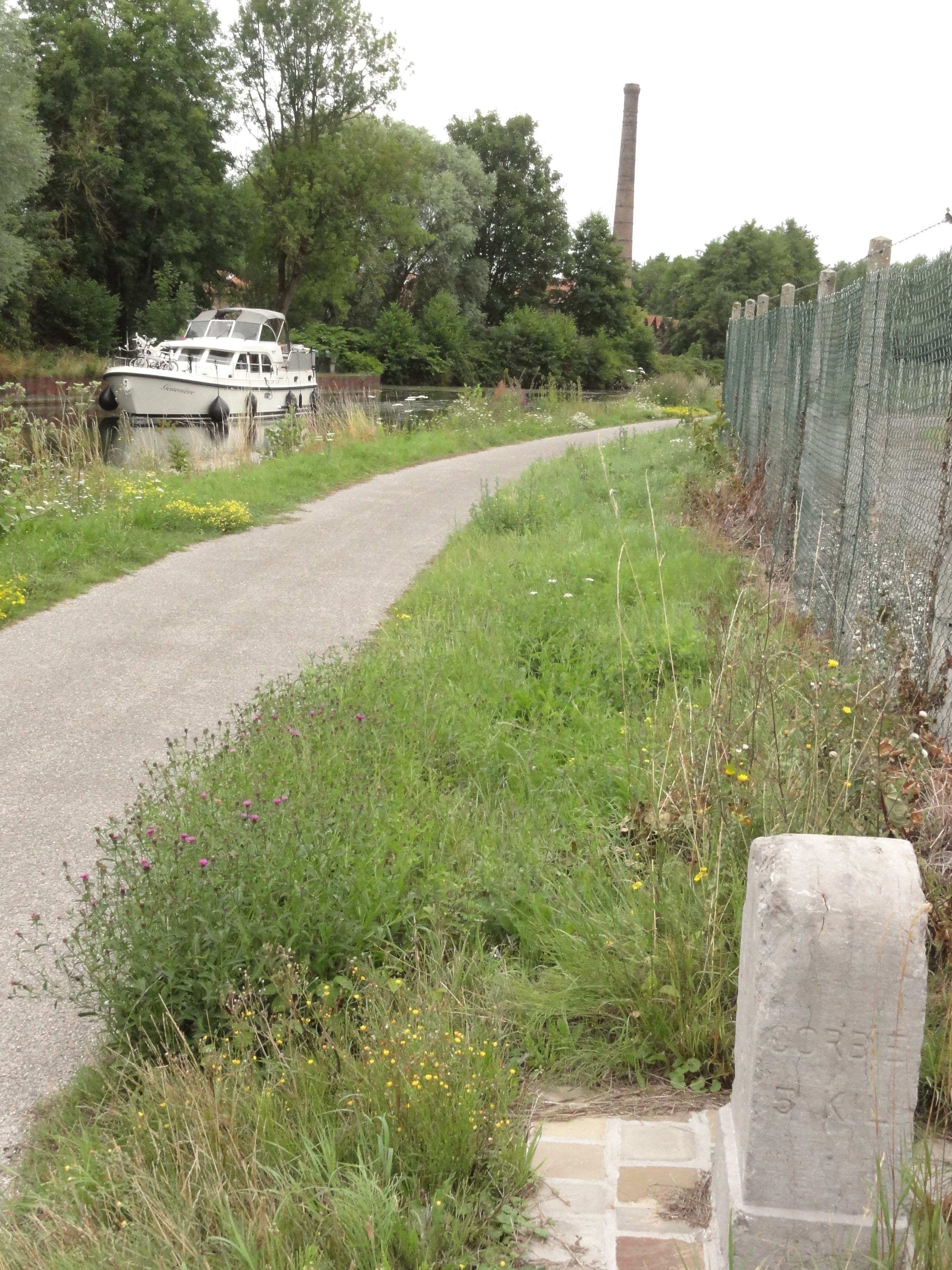 Daours (Somme) véloroute de la Somme. Au fond, la cheminée de l'usine du Parquet Loutré . .